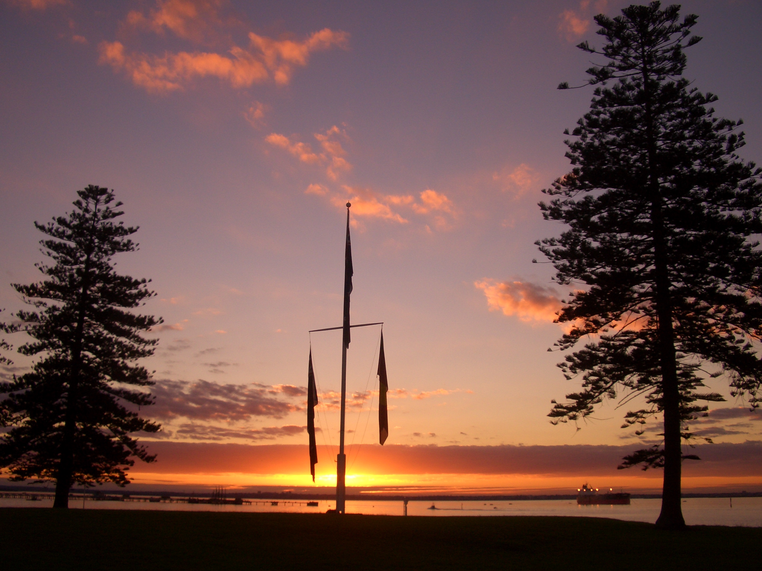 Kurnell Flags at sunset